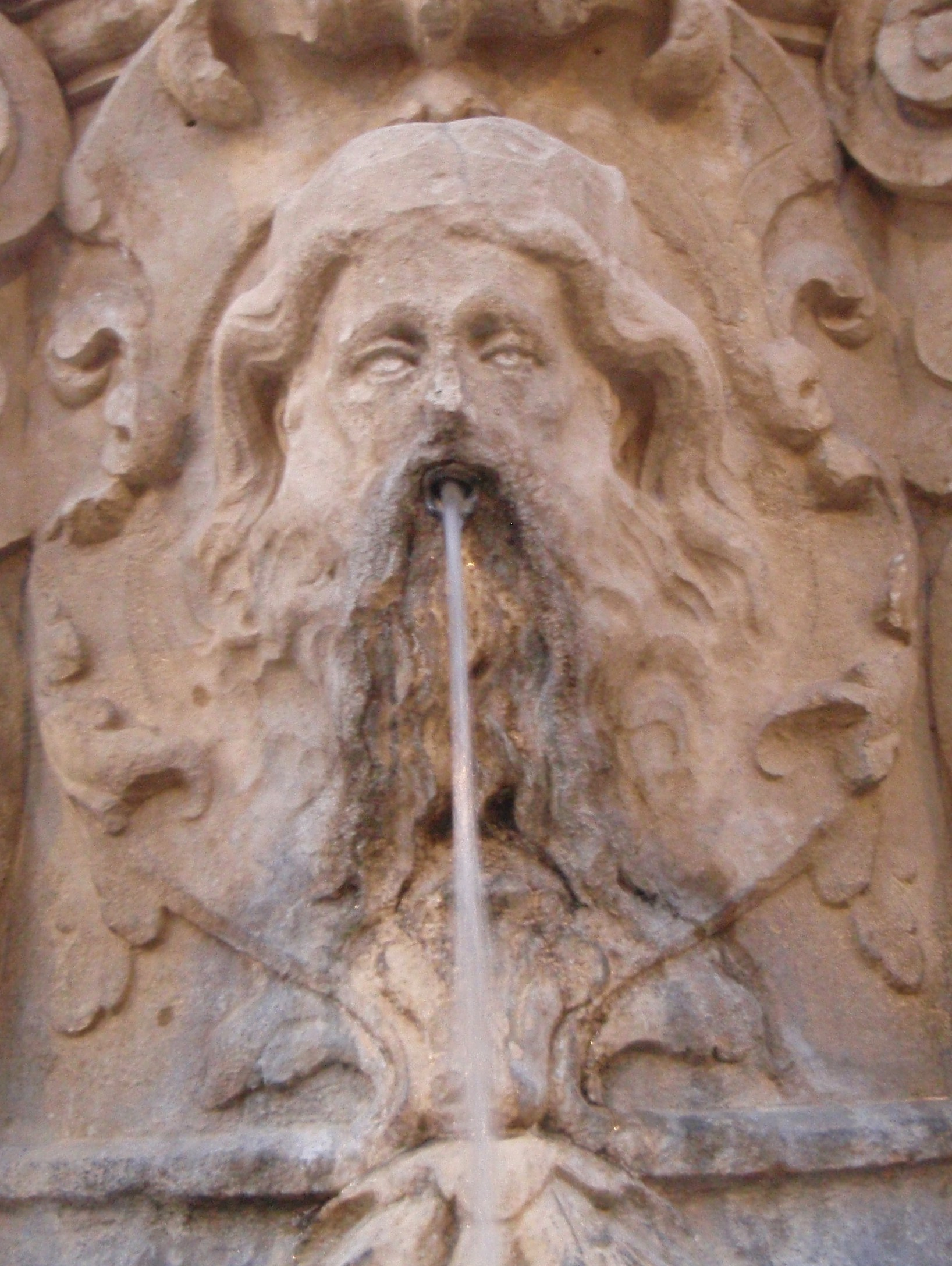 Mascaron de la fontaine du Parlement à Bordeaux. La fontaine fut installée en 1865 et dessinée par l'architecte bordelais Louis Garros, à qui l'on doit également l'hôtel Exshaw, belle illustration de l'art gothique anglais, sa plus belle réalisation. Des mascarons y délivrent l'eau.